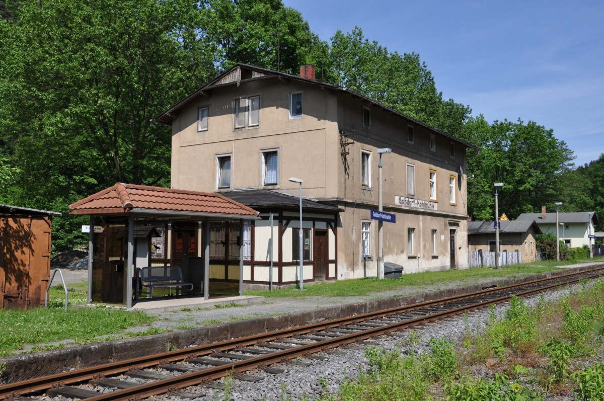 Bahnhof Goßdorf-Kohlmühle der Bahnstrecke Bautzen–Bad Schandau und der ehemaligen Schwarzbachbahn